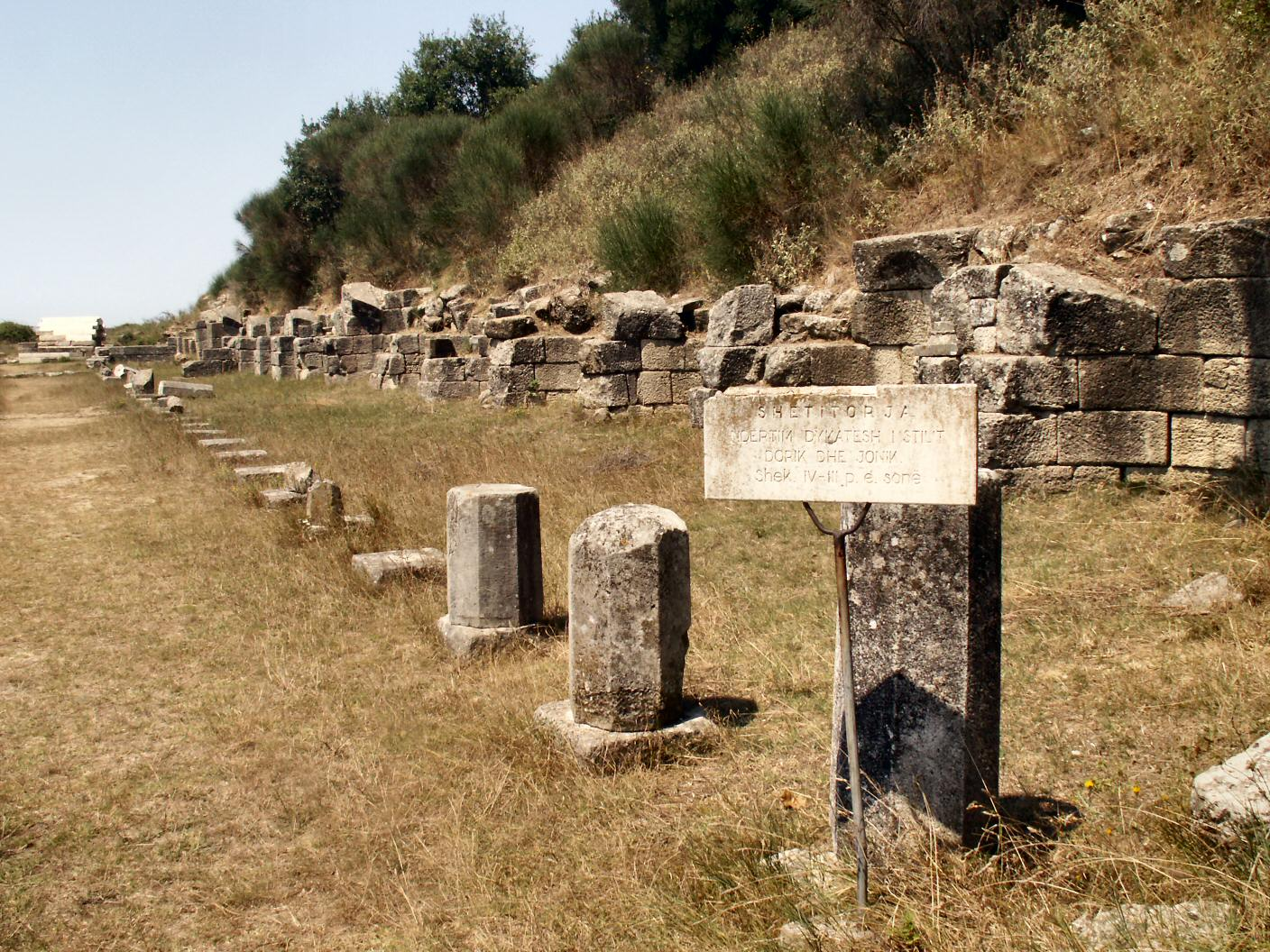 Apollonia - Driving Albania 178